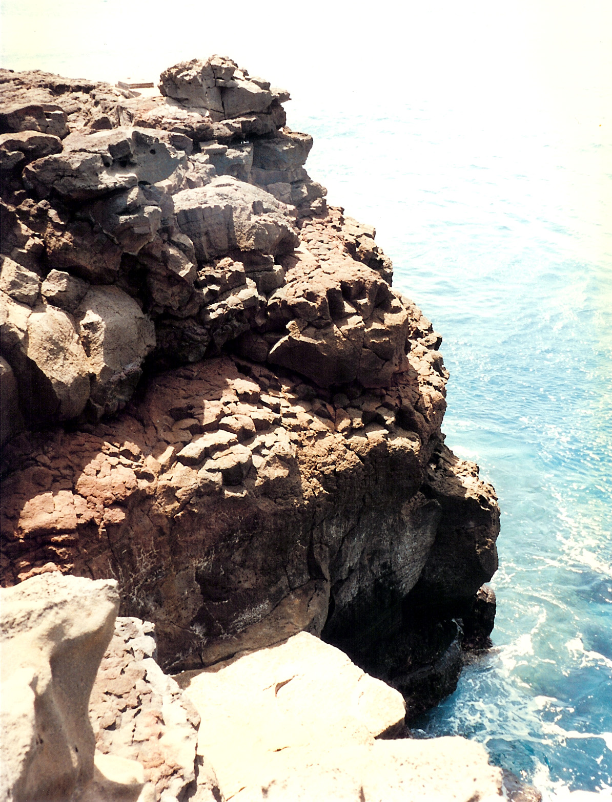 Rocks at Ka Lae, Hawaii, USA